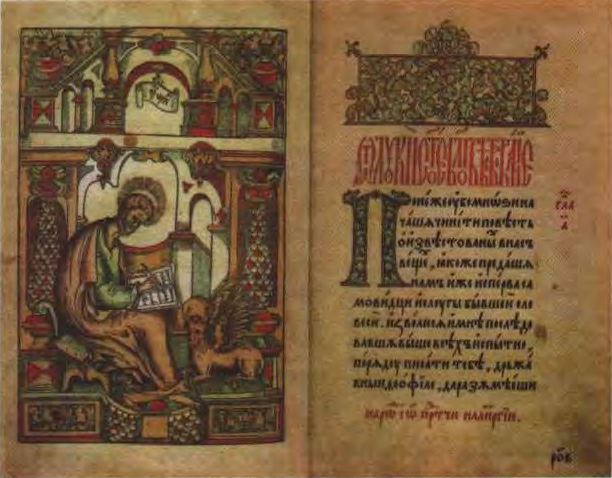 Разворот Евангелия. Пётр Мстиславец. Вильна. Типография Мамоничей. 1575 год.